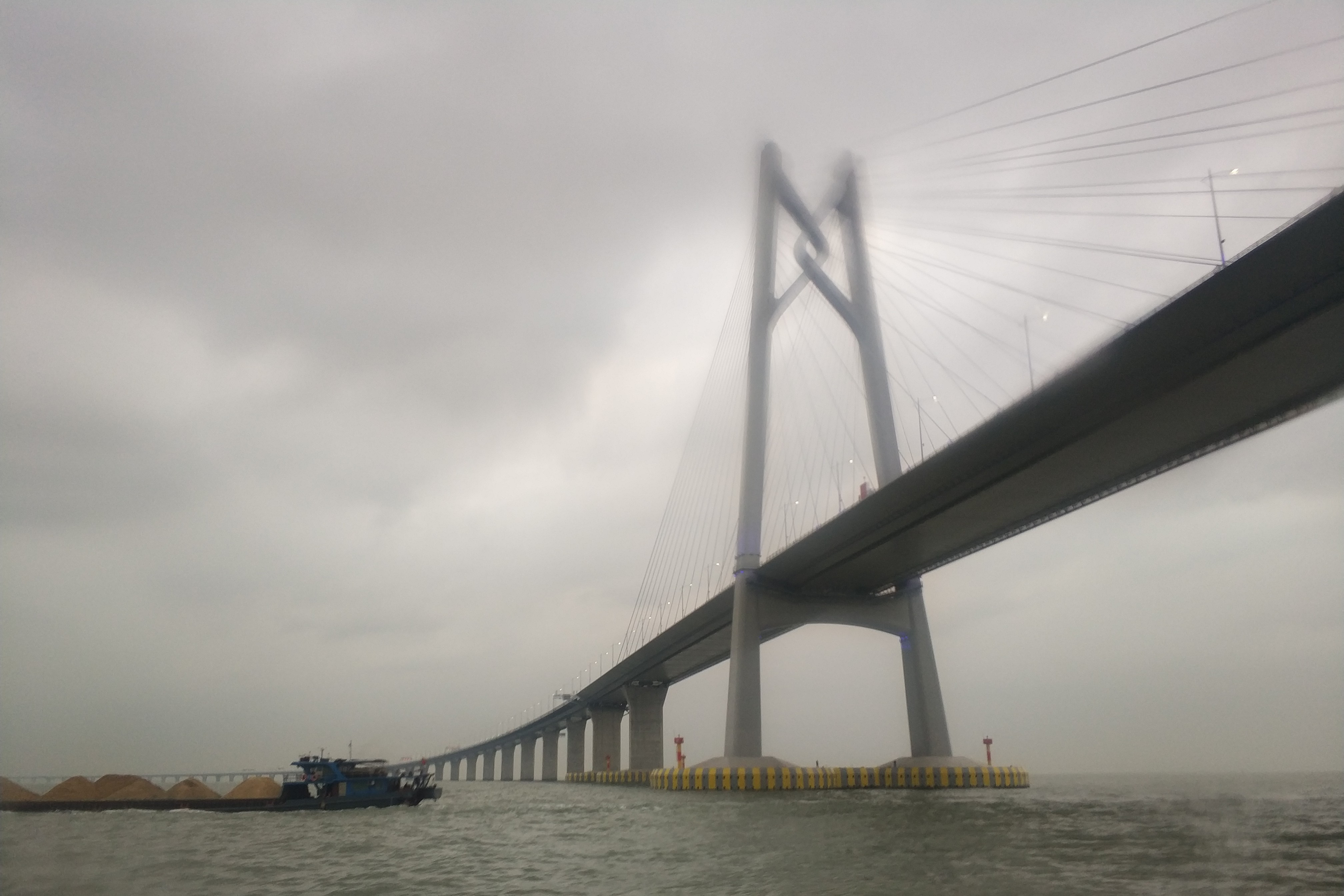 港珠澳大桥青洲航道桥主跨，摄于澳门至蛇口船上